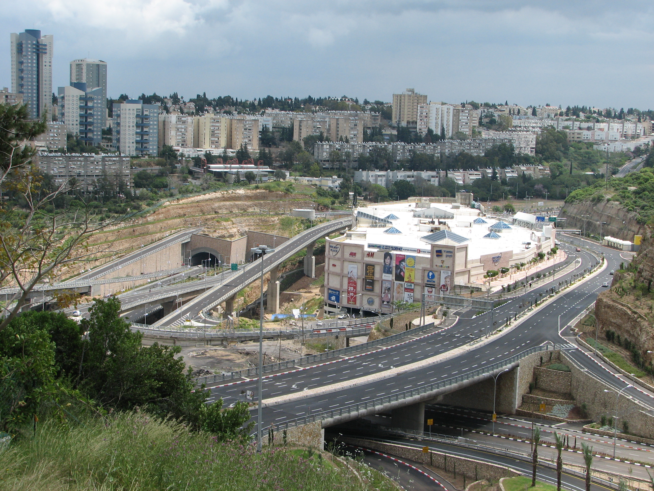 Aerial Photography o armel Tunnels. Neve Shaanan Intercange, Haifa Israel מנהרות הכרמל מחלף נוה שאנן של מנהרות הכרמל. ברקע בתי שכונת יזרעאליה